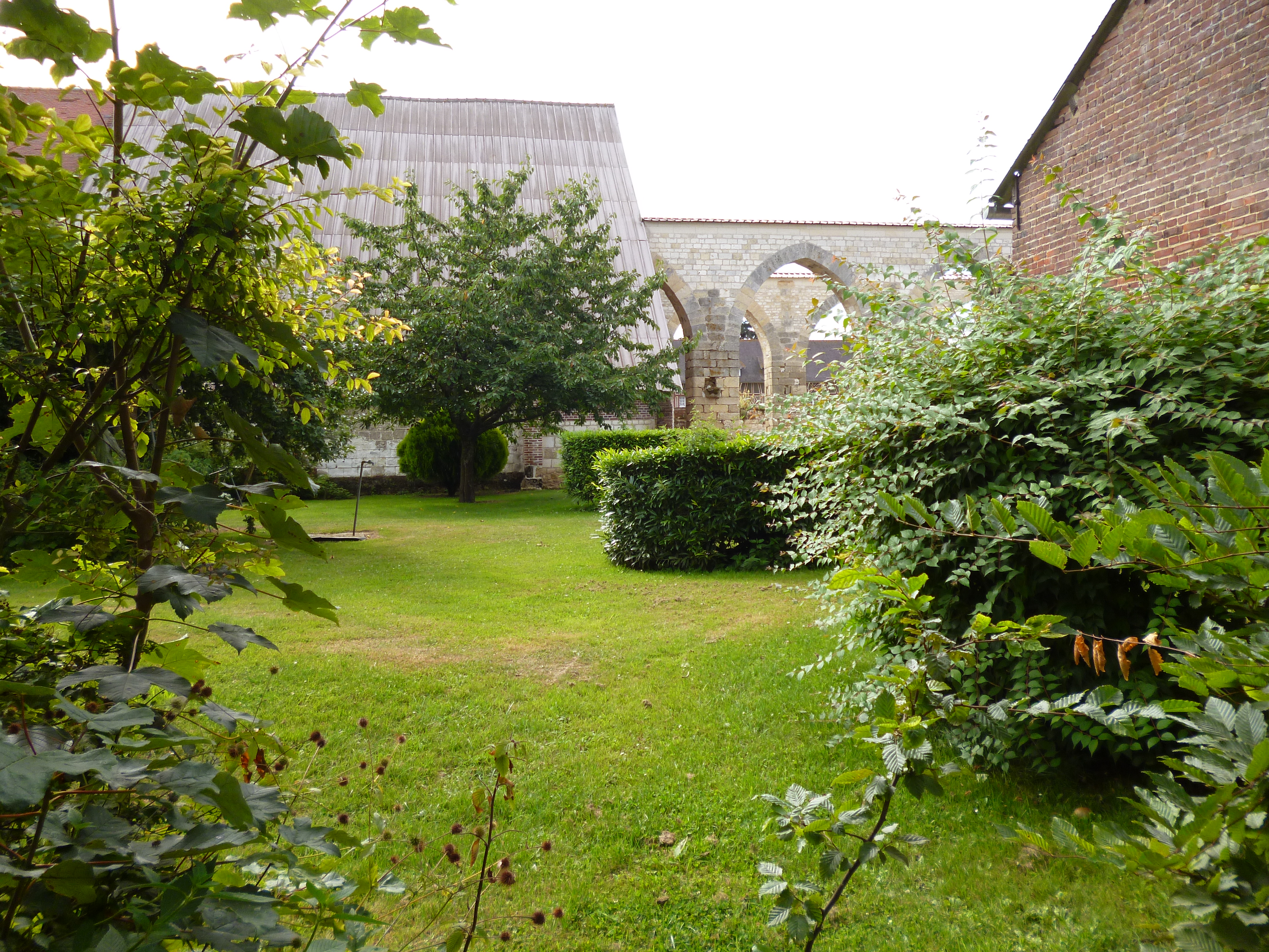 Grange de Grandmesnil, située sur la commune de Camprémy (Oise, Picardie), inscrite 1992